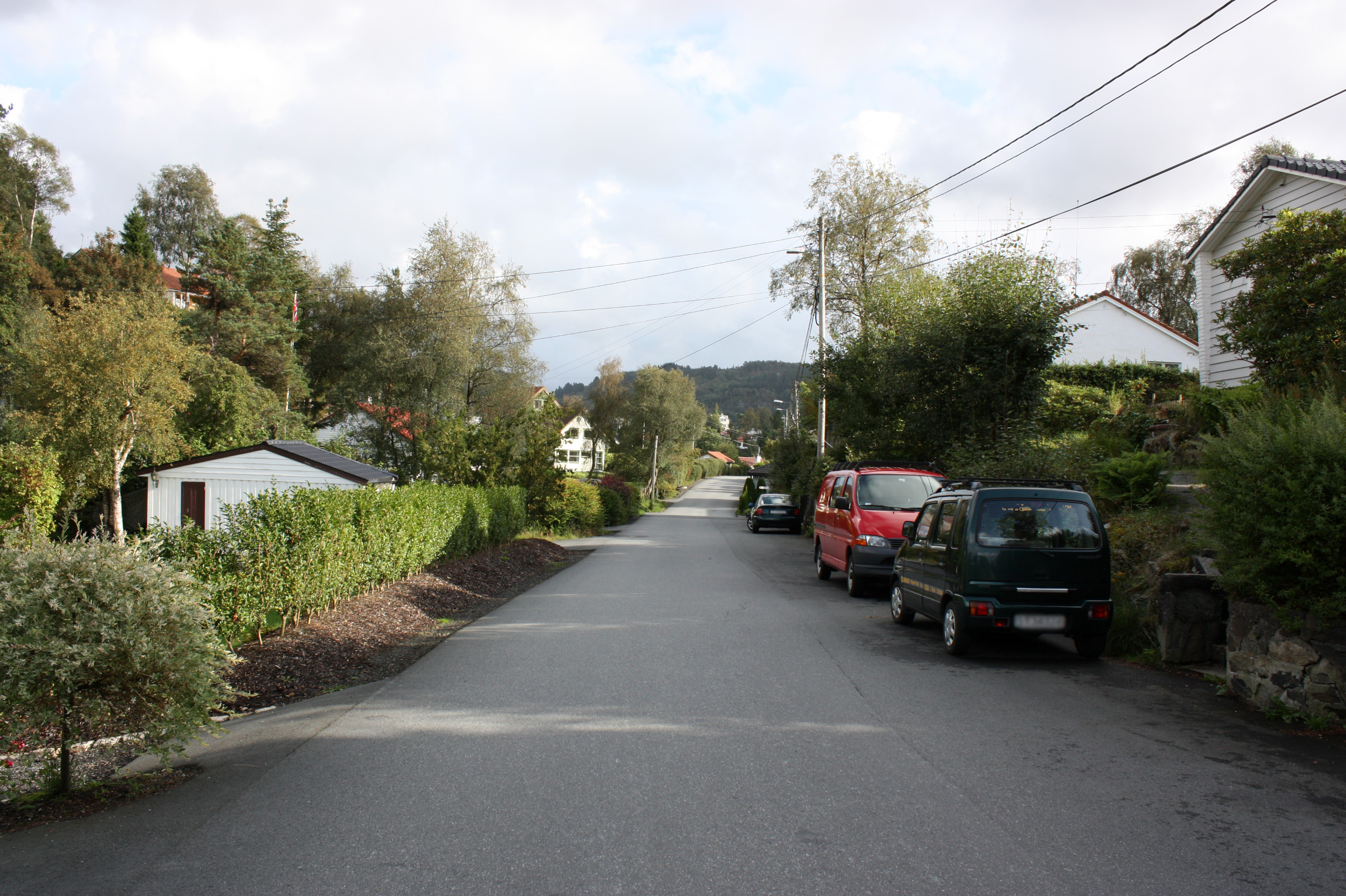 Friggs veg, Fana, Bergen.